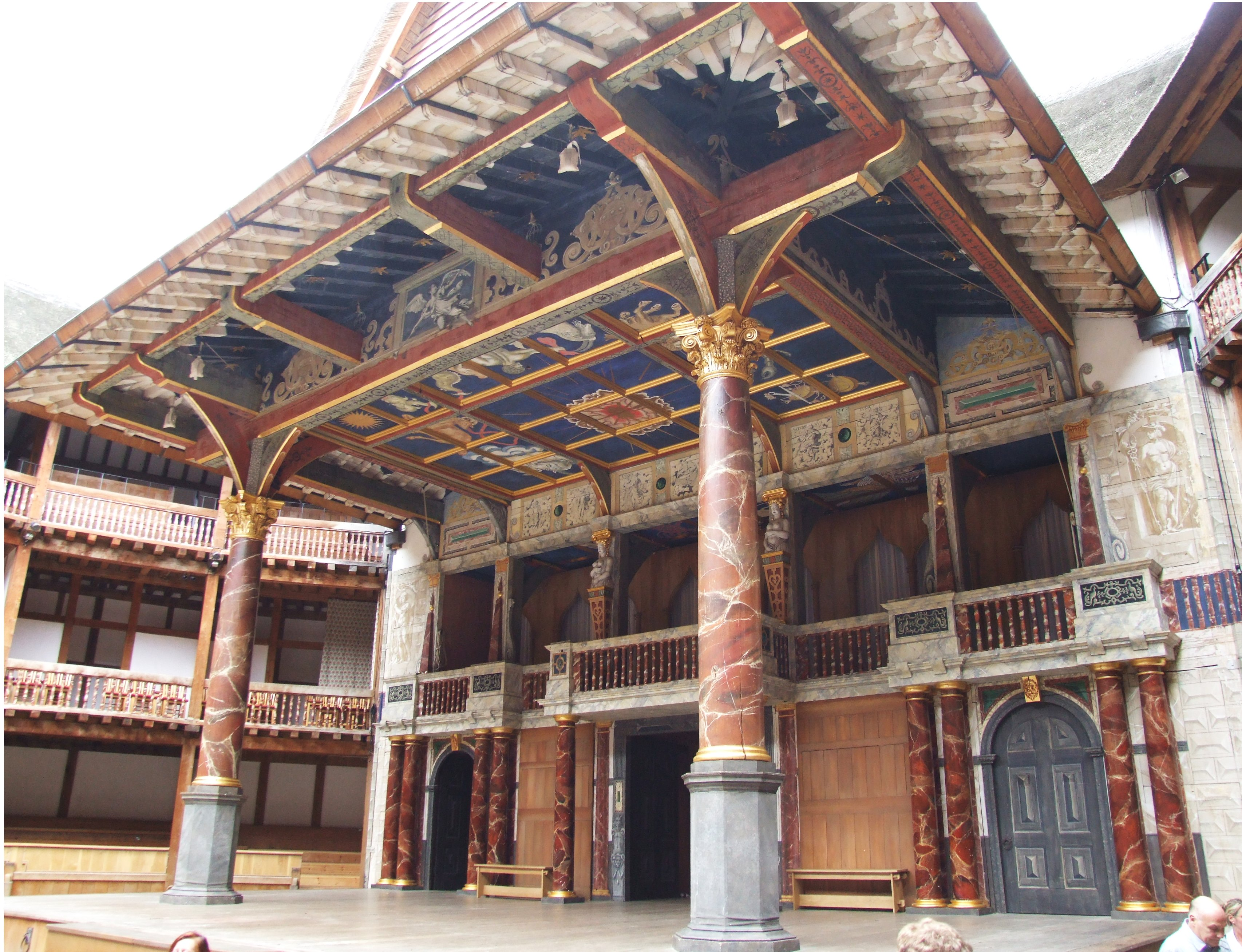 Bühne des Globe Theatre in London